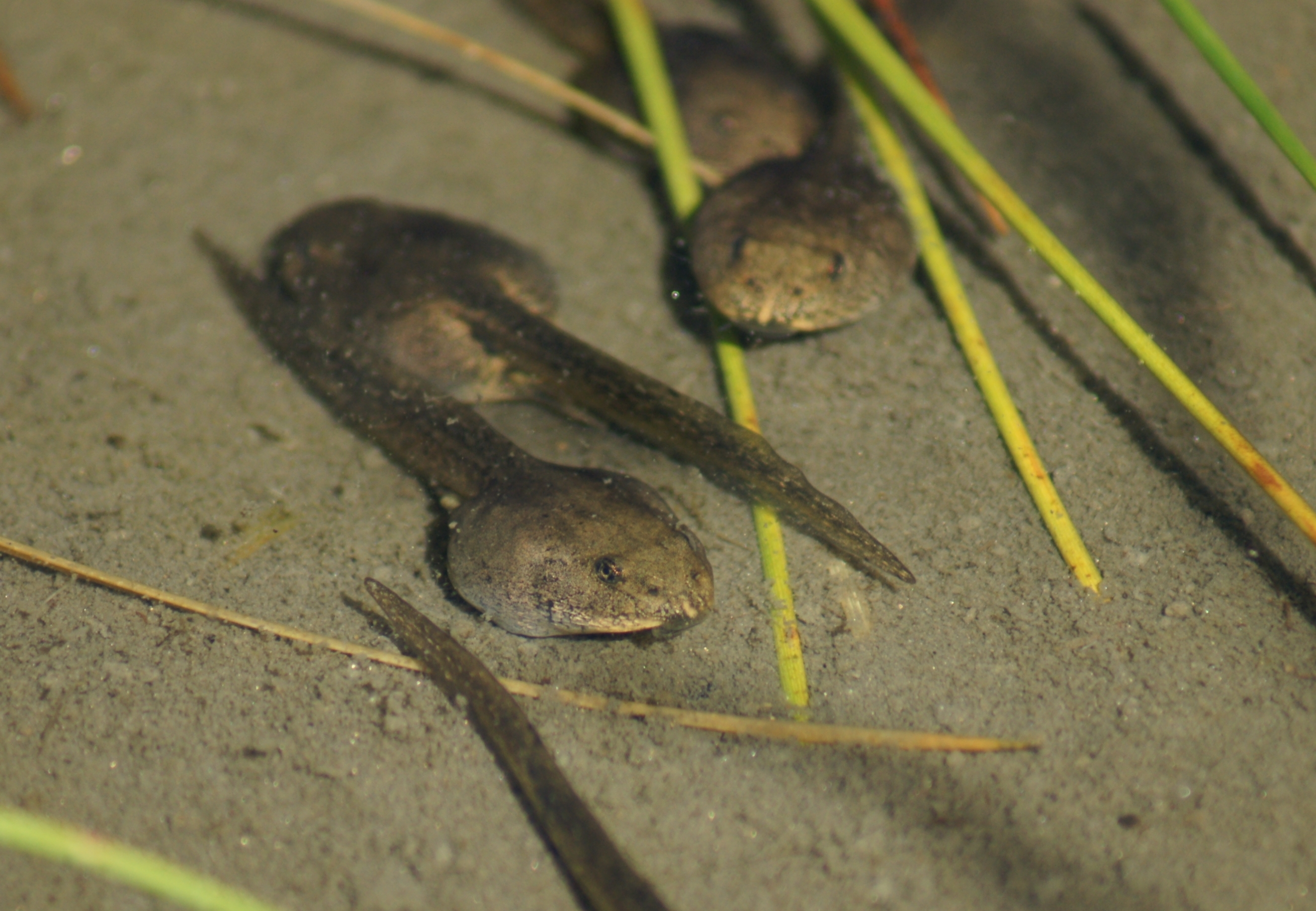 Kaulquappen sind nachembryonale Entwicklungsstadien – die Larven – der Froschlurche. Abgebildet in der Nähe des Herzsees am Fusse des Hochjochs.